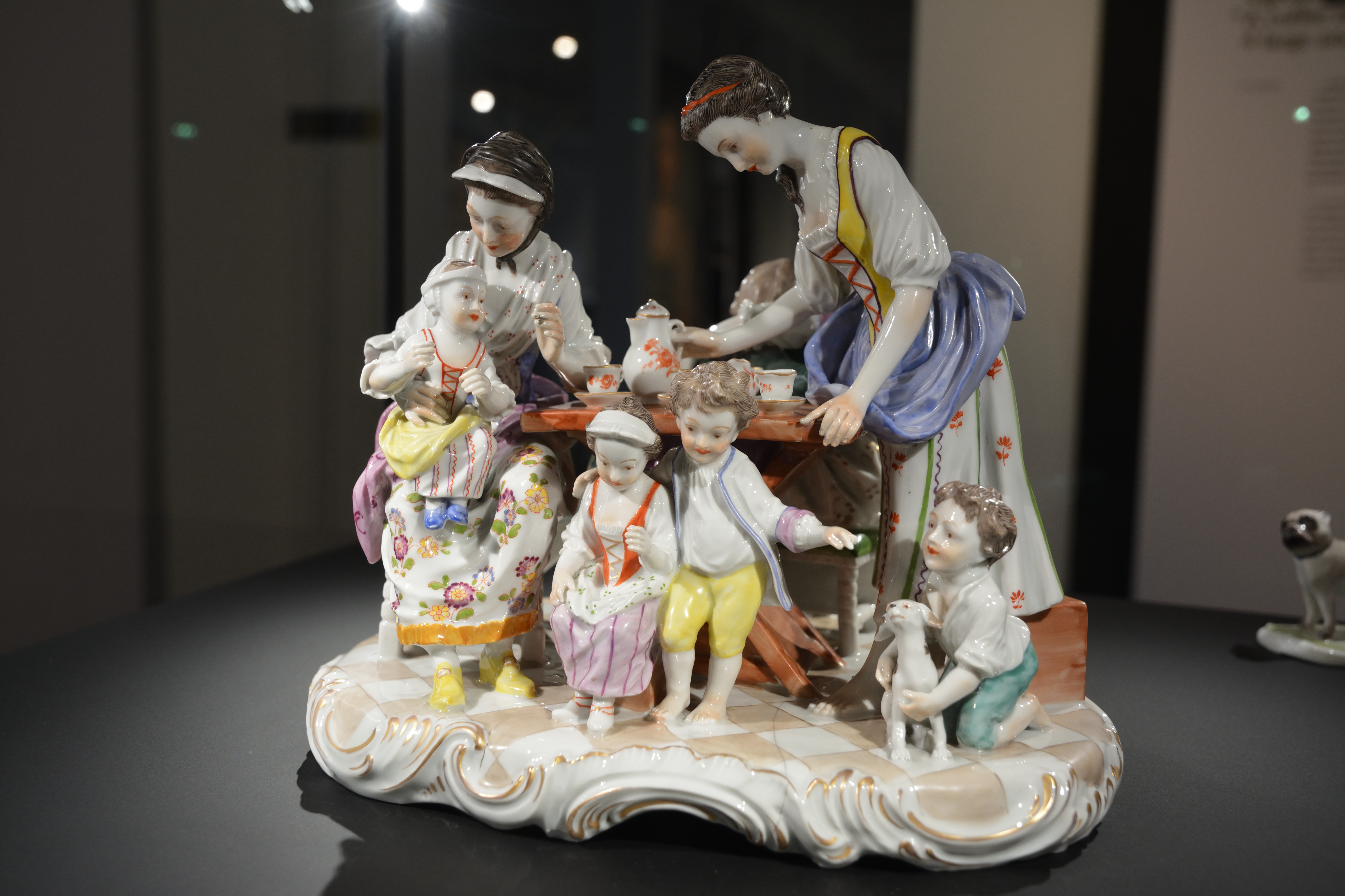 Impressionen vom Porzellanmuseum Schloss Fürstenberg Die Kaffeegesellschaft 1770 von Jean Jacques Desoches